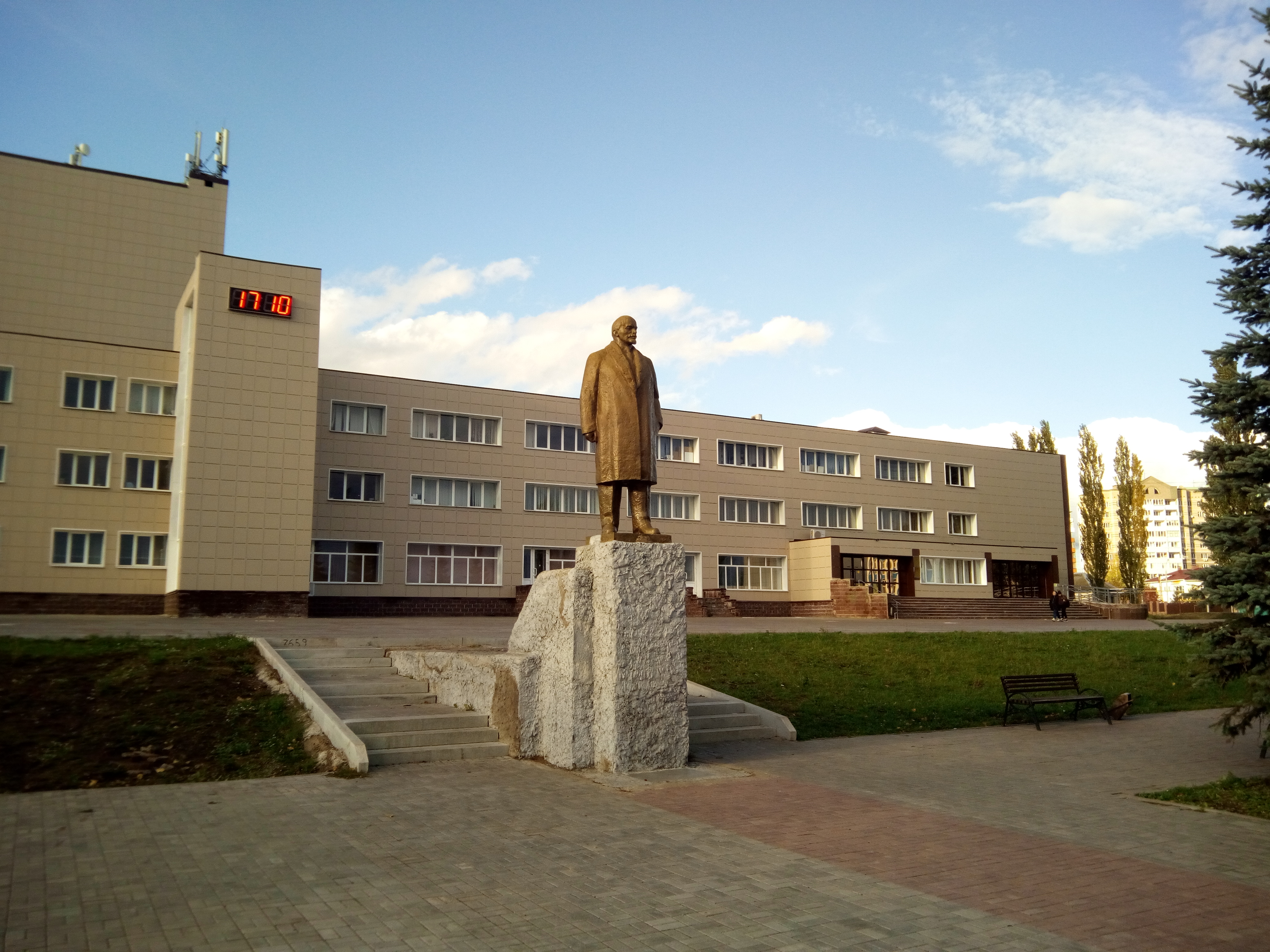 Благове́щенск — административный центр Благовещенского района Республики Башкортостан Башҡортса: Благовещен — Башҡортостандың Благовещен районының административ үҙәге.